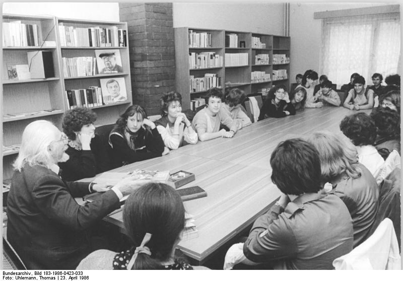 Berlin, Jugendstunde im Literaturzentrum ADN-ZB Uhlemann 23.4.86 Berlin: Jugendstunde. Gast einer Jugendstunde war Jan Koplowitz. Schüler von 8. Klassen der August-Bebel-Oberschule verfolgten im Literaturzentrum Berlin-Mitte aufmerksam die Schilderungen des bekannten Schriftstellers. Die Mädchen und Jungen haben am 10.5.1986 in der Volksbühne ihre Jugendweihe.